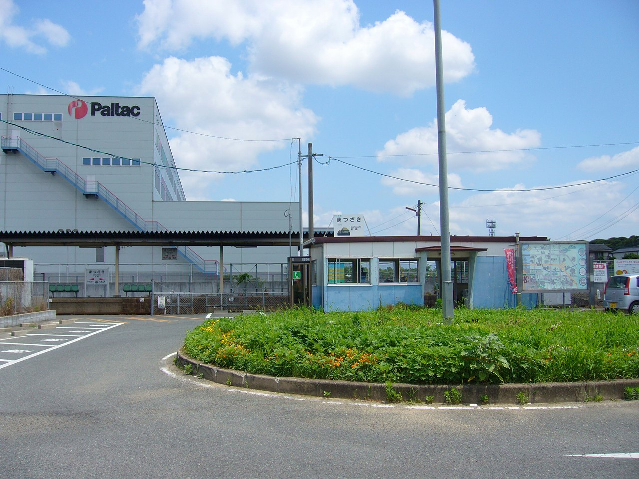 駅舎 投稿者撮影